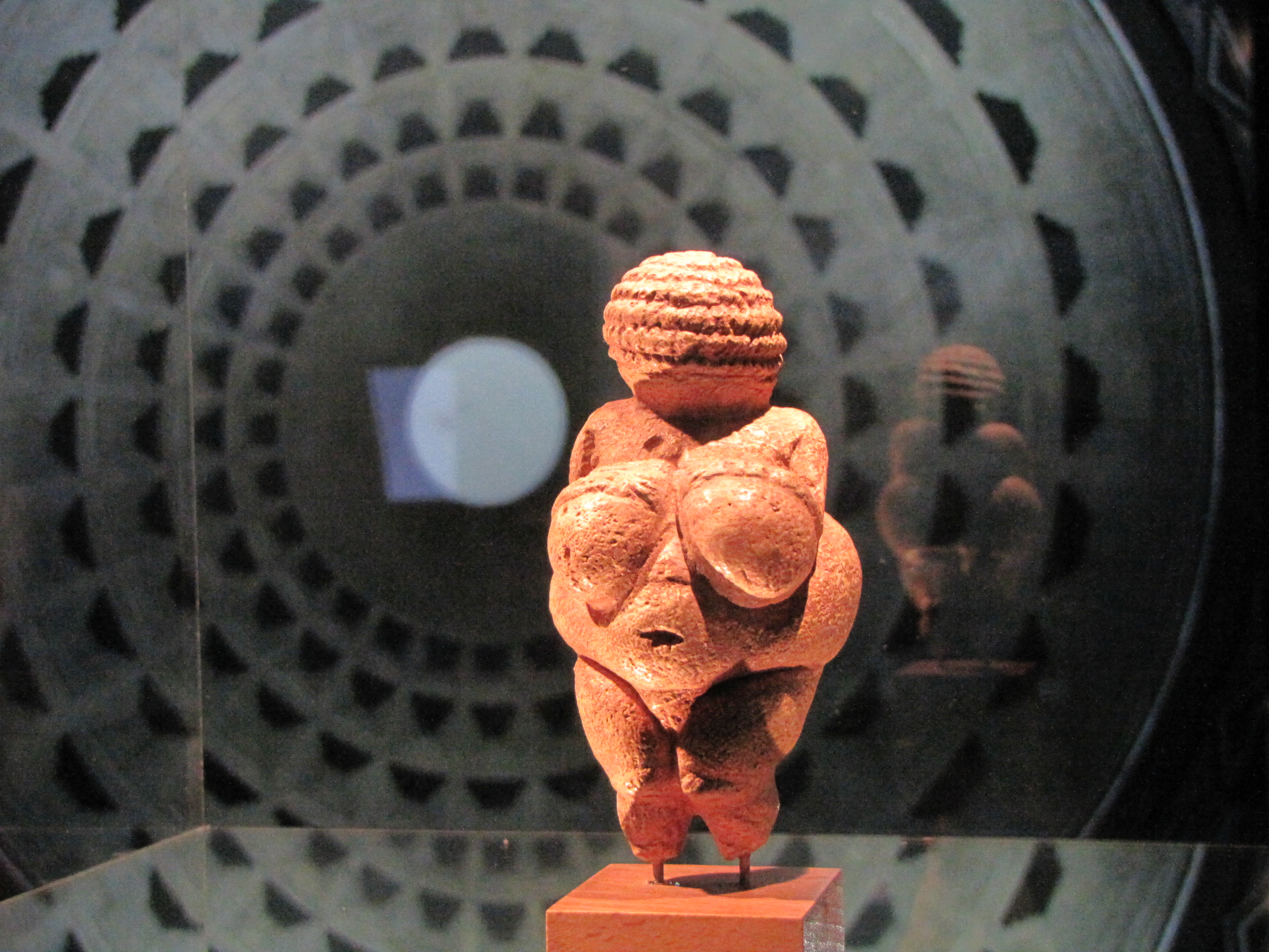 Gasometer Oberhausen. Ausstellung "Magische Orte", 2011. Venus von Willendorf. Kalkstein, 25.000 vor Christus.